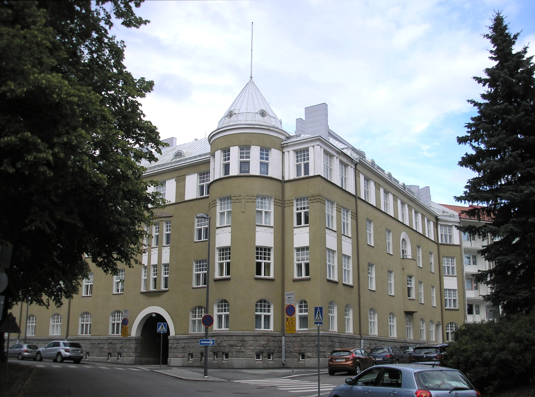 "Tuomisen kivimuuri", rakennus Tampereen Jussinkylässä.